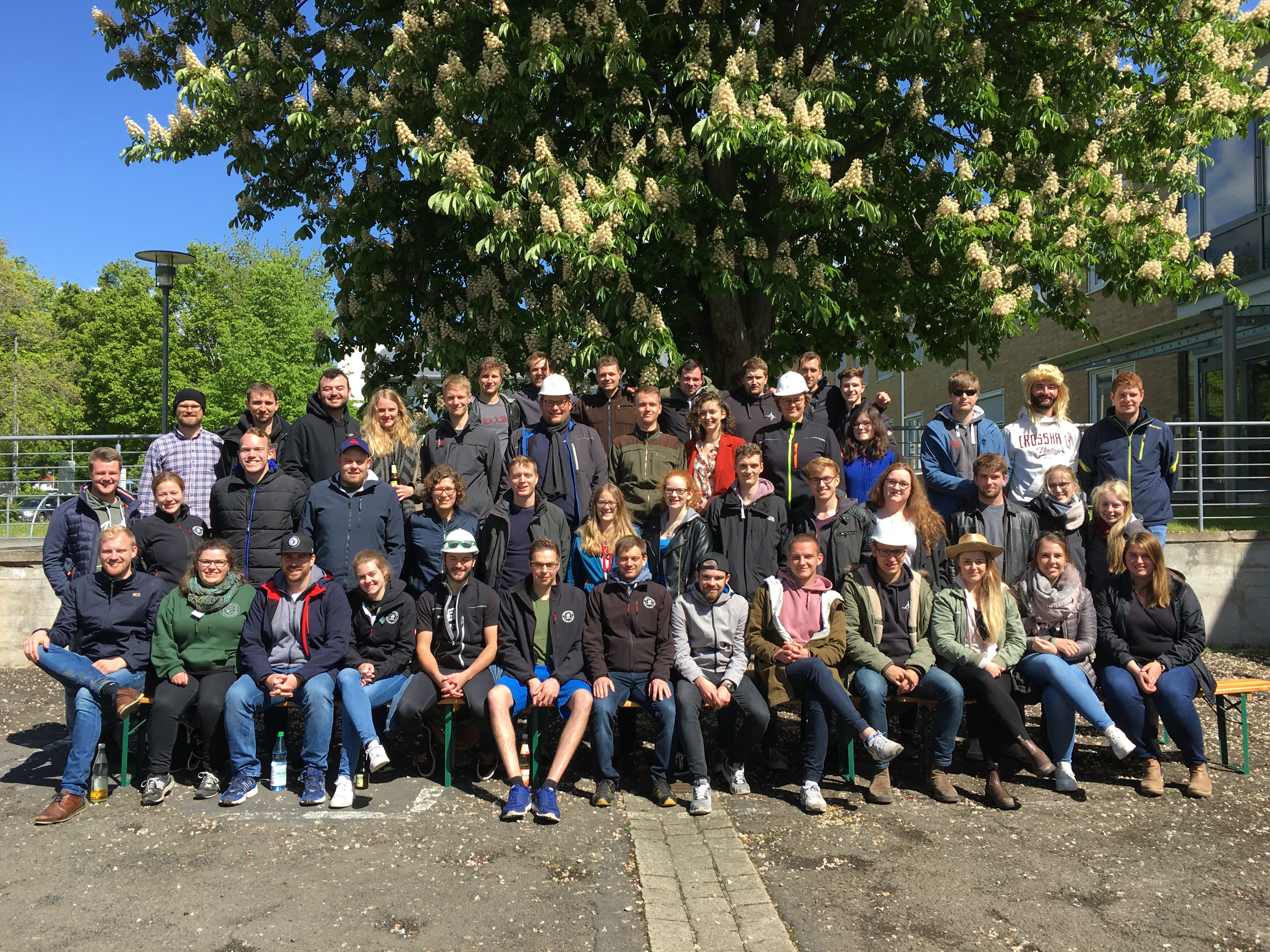 Die Teilnehmer der BAFT in Göttingen im Sommersemester 2019. Ort: Göttingen Datum: 12.05.2019